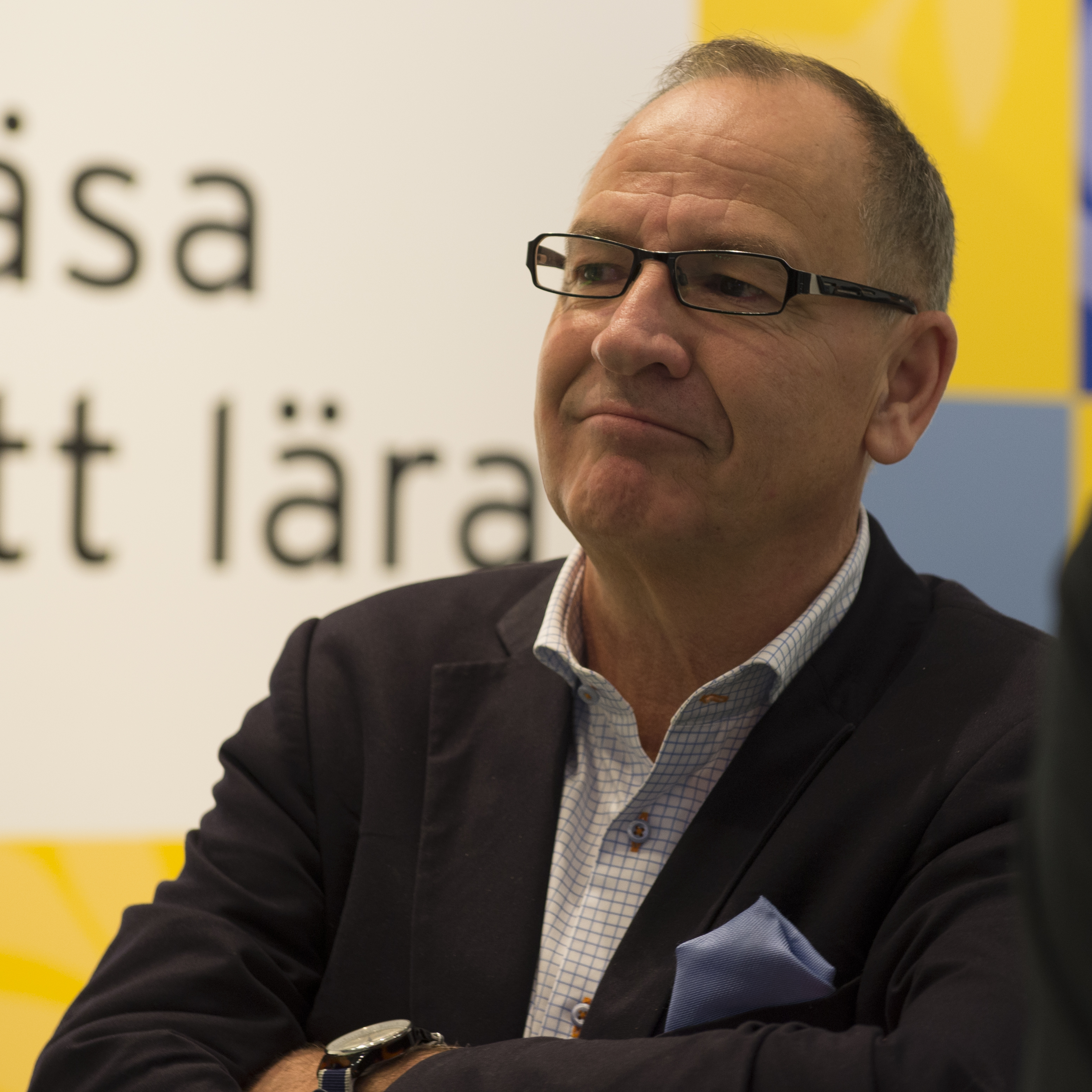 Bo Jansson på Bok- och biblioteksmässan 2013.